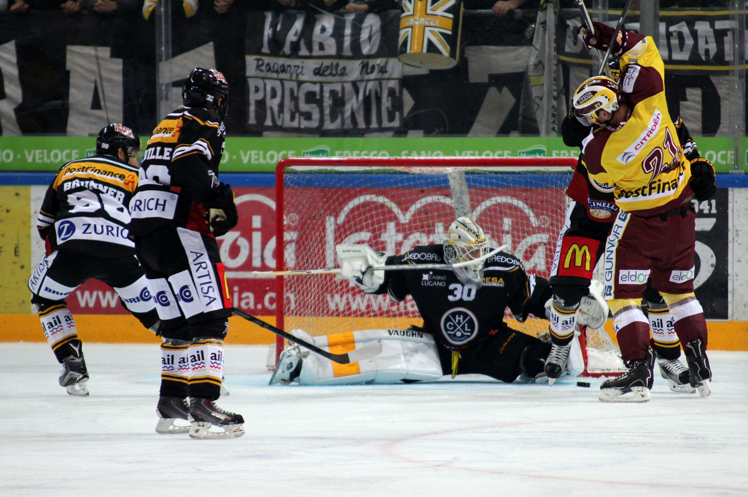 Damien Brunner (L 98), Sébastien Reuille (L 32), Elvis Merzļikins (L 30), Philippe Furrer (L 7), Tim Traber (G 21).